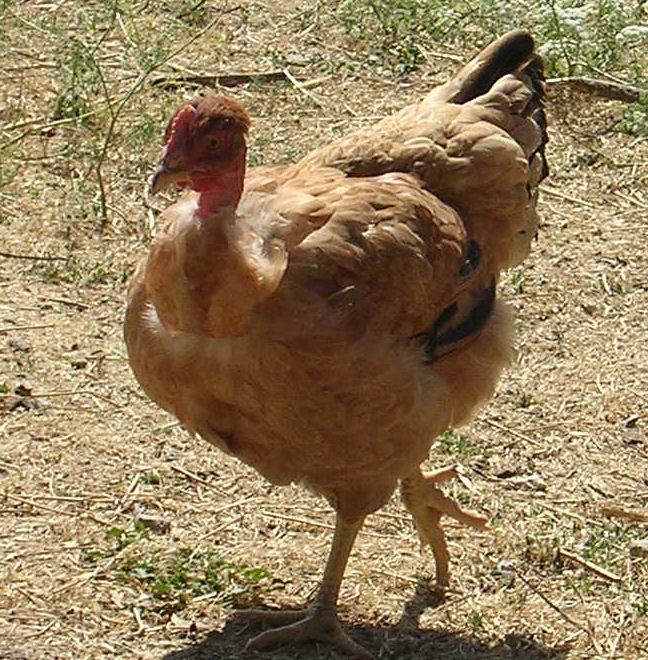 Poule